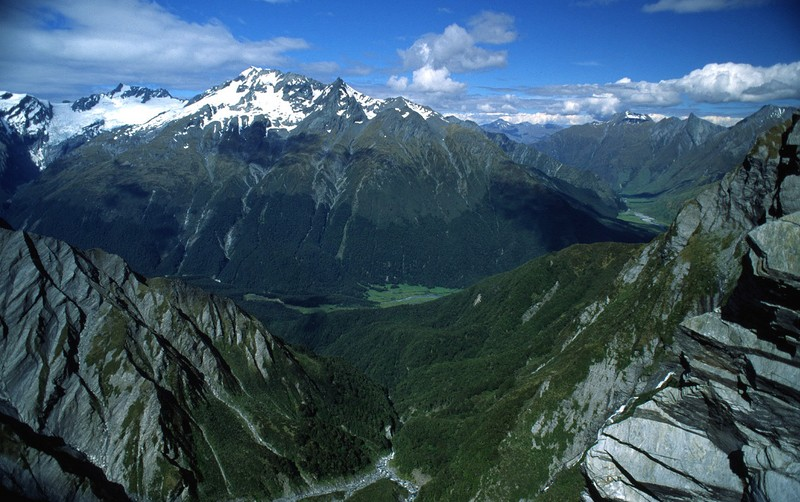 Matukituki valley - new zealand